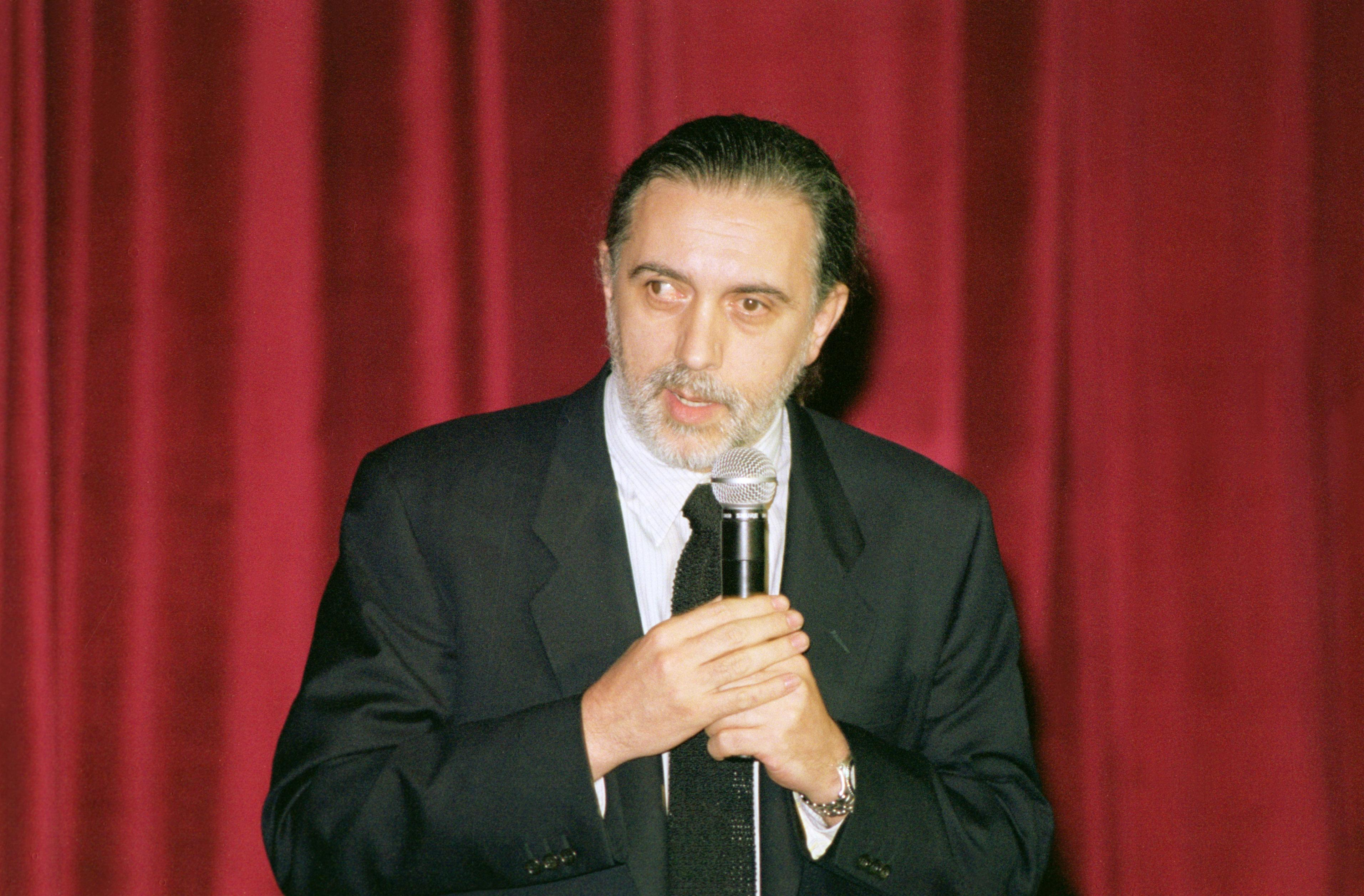 Fernando Trueba bizqueando ante la perspectiva de una sinecura sustanciosa 01